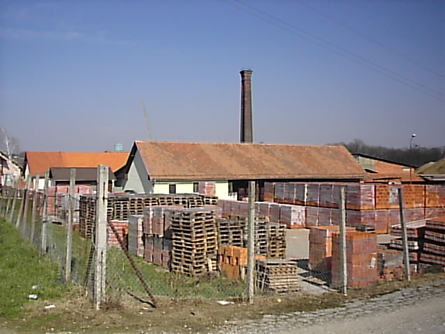 Opekarna OPTE Ptuj